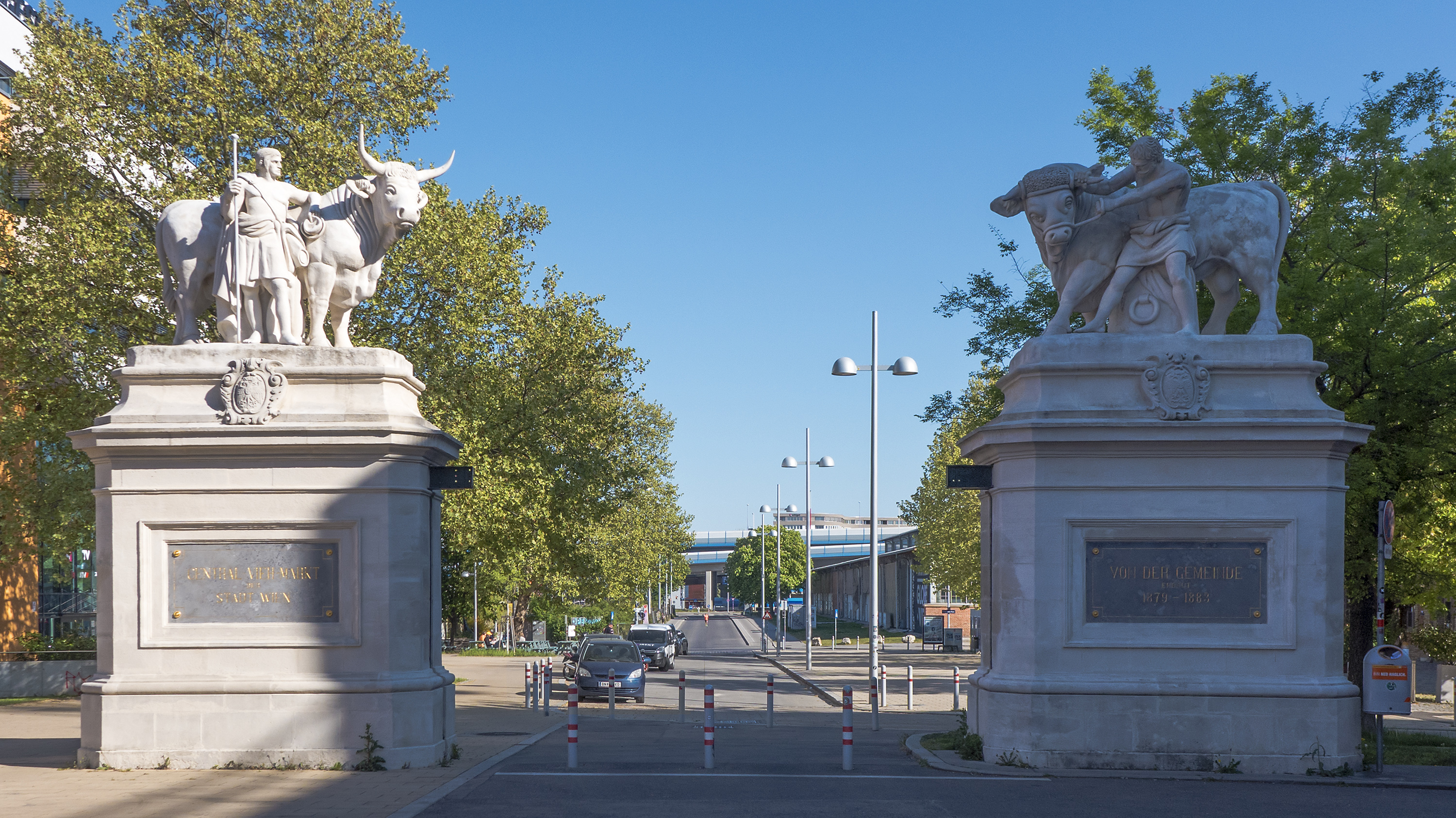 Zentralviehmarkt St. Marx - Portal in Wien 3